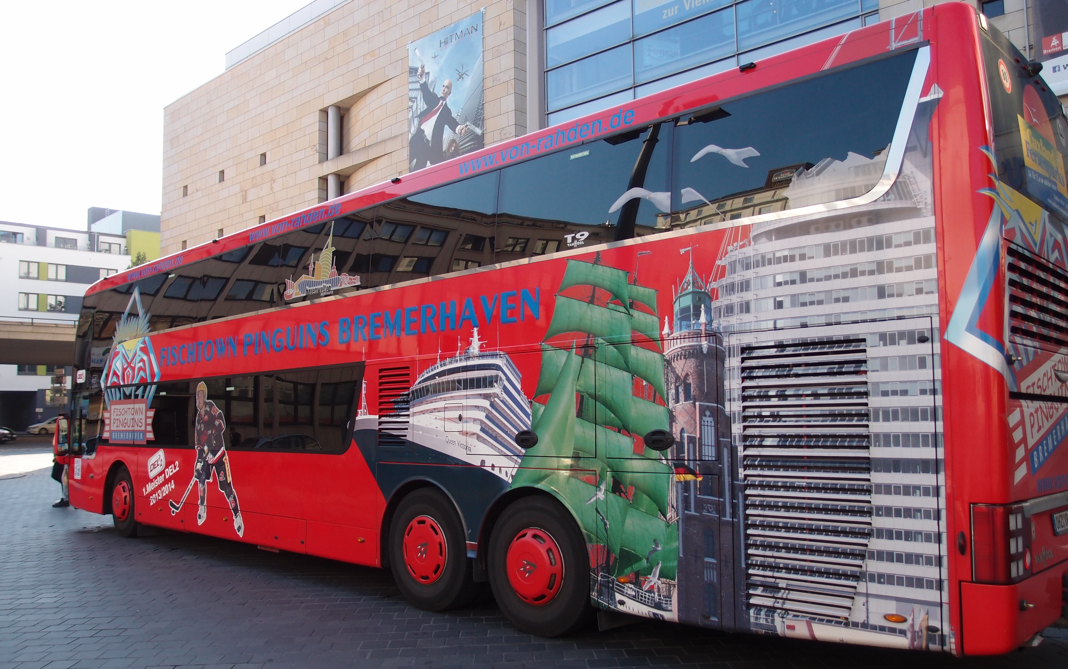 Mannschaftsbus der Fischtown Pinguins